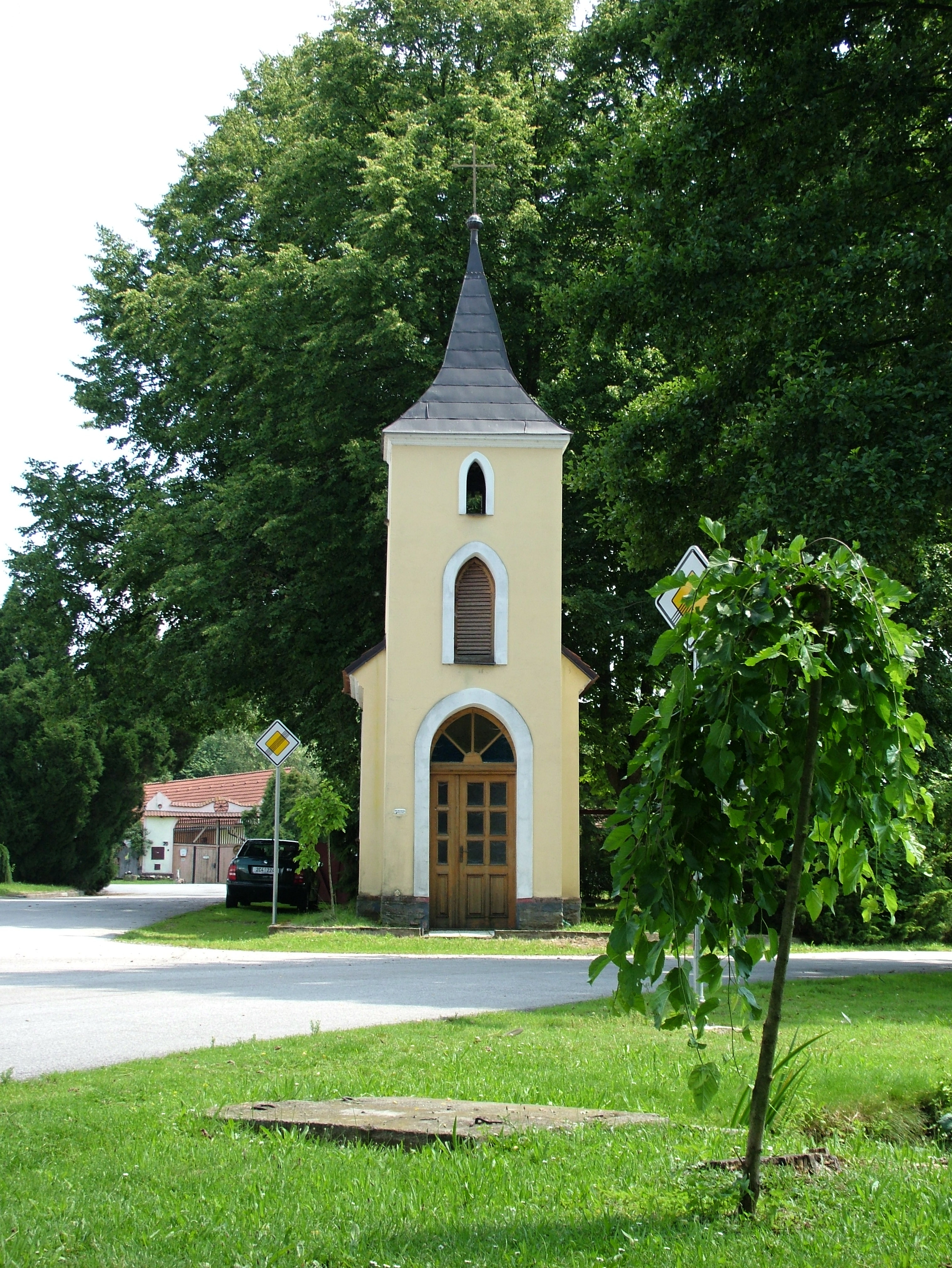 návesní kaple Sedlec (Temelín)